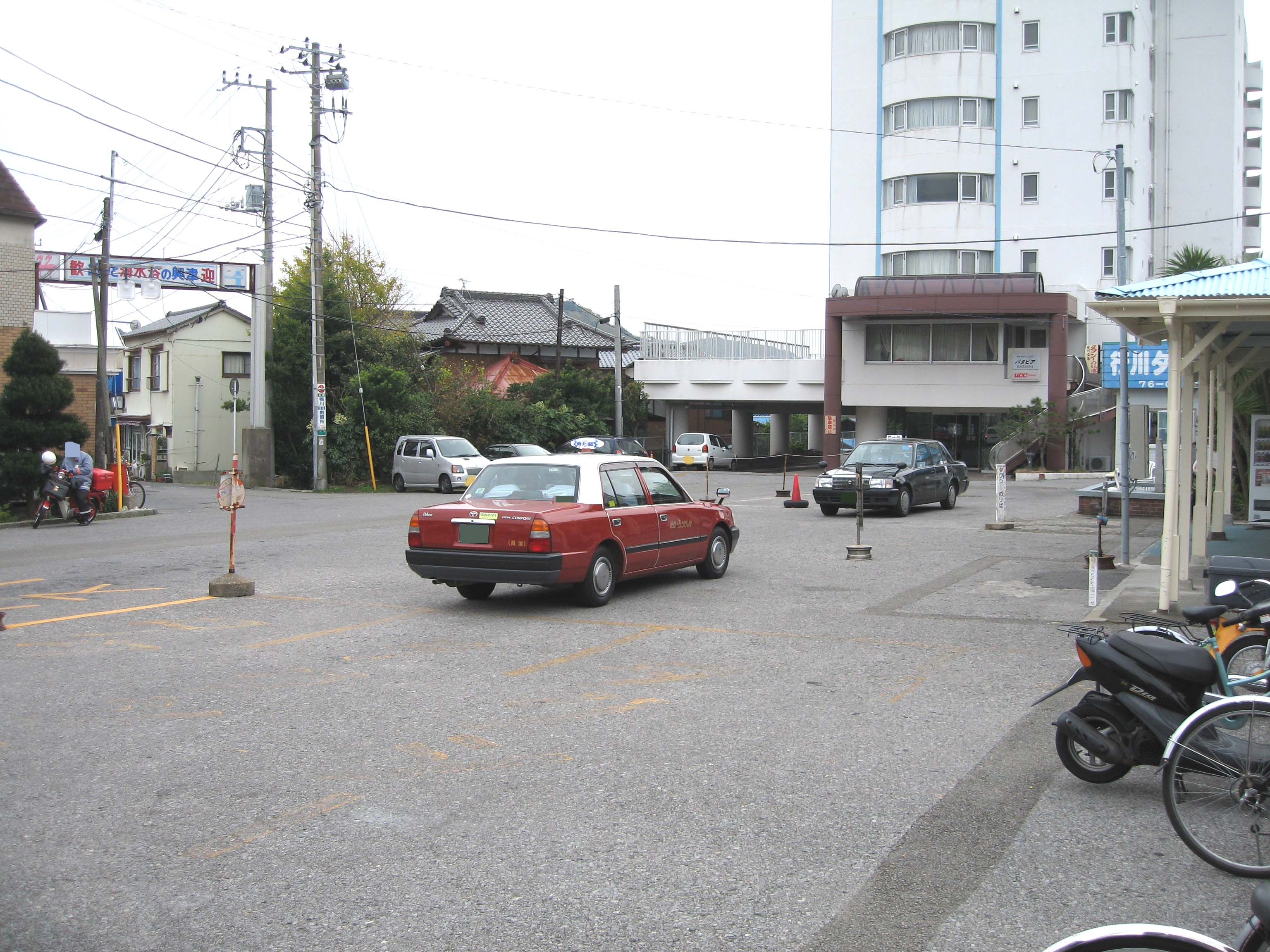 Kazusaokitsu station, Sotobo Line, Chiba, Japan, 上総興津駅駅前